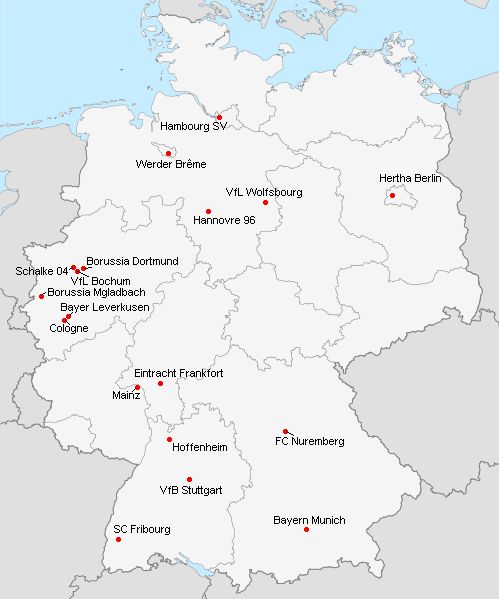 Répartition des clubs en 1.Bundesliga 2009-2010.